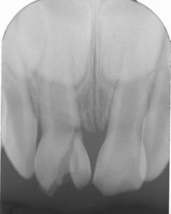 fracture émail dentine cément